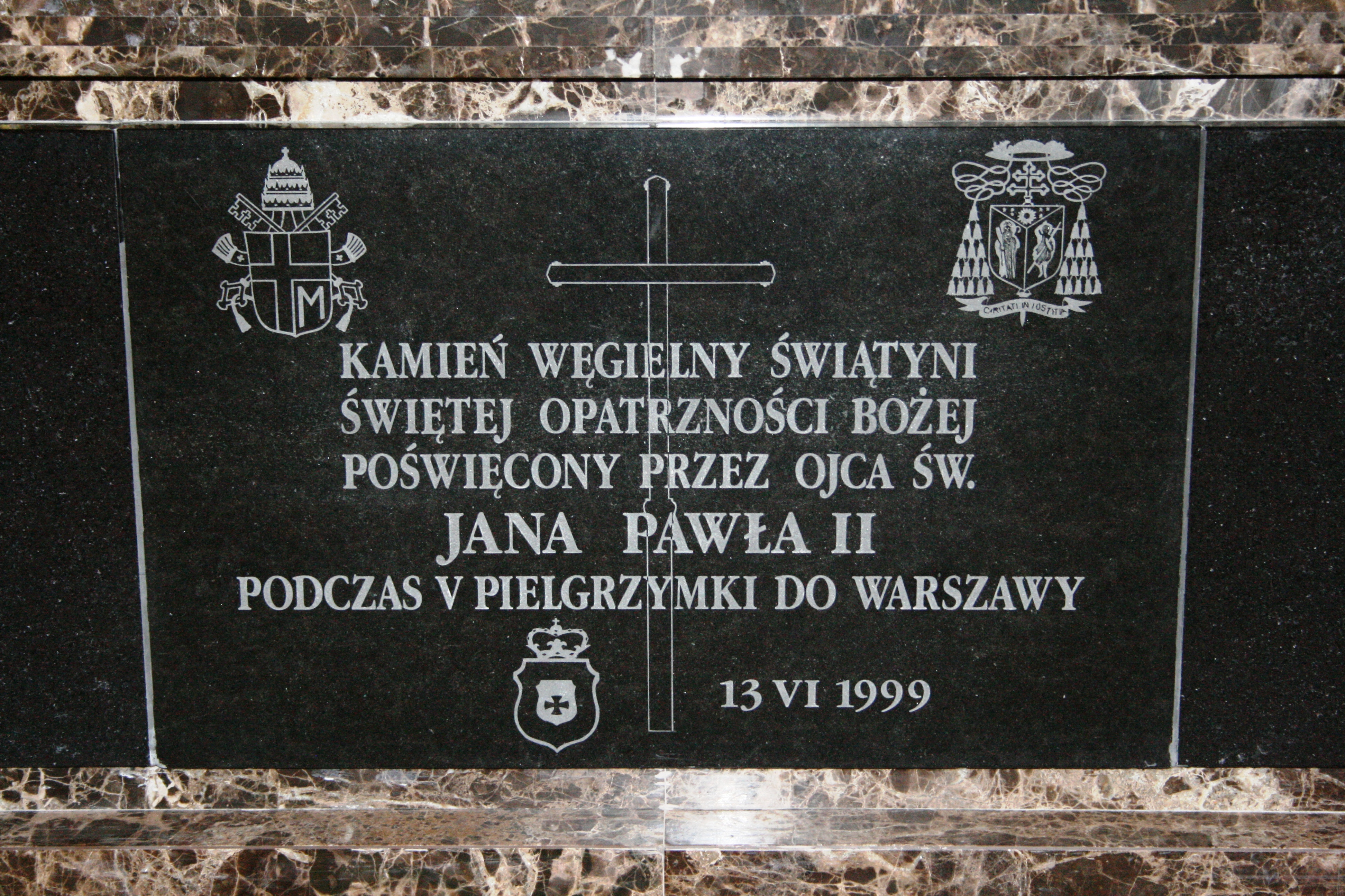 Kamień węgielny Świątyni Opatrzności Bożej w Warszawie znajdujący sie w dolnym kościele